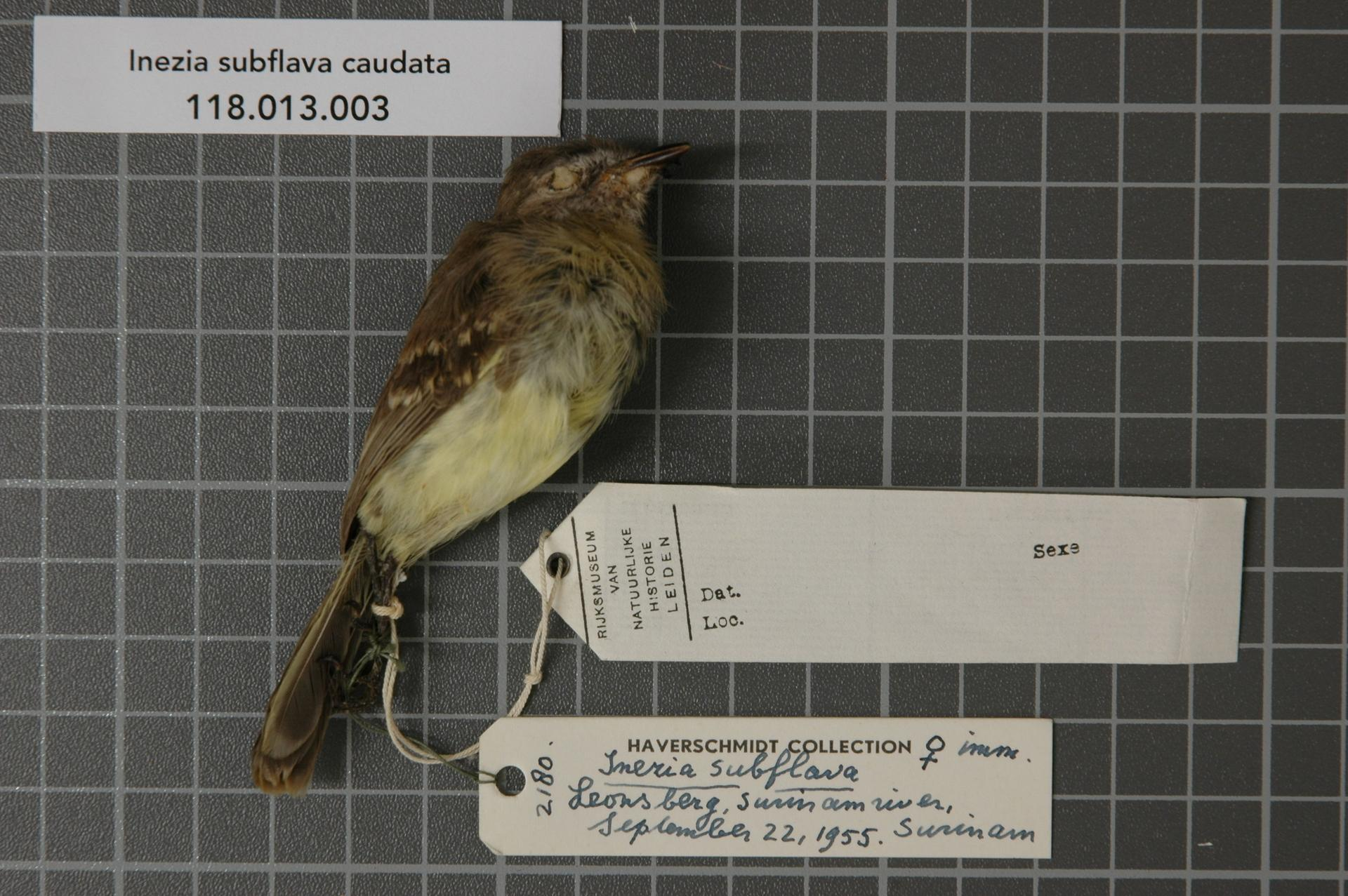 Inezia subflava caudata (Salvin, 1897)